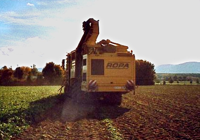 Dreiachsiger ROPA-Rübenroder Tiger, Rübenvollernter in der Lenkungsart „Hundegang“ zur Schonung des Ackerbodens, Ansicht von hinten